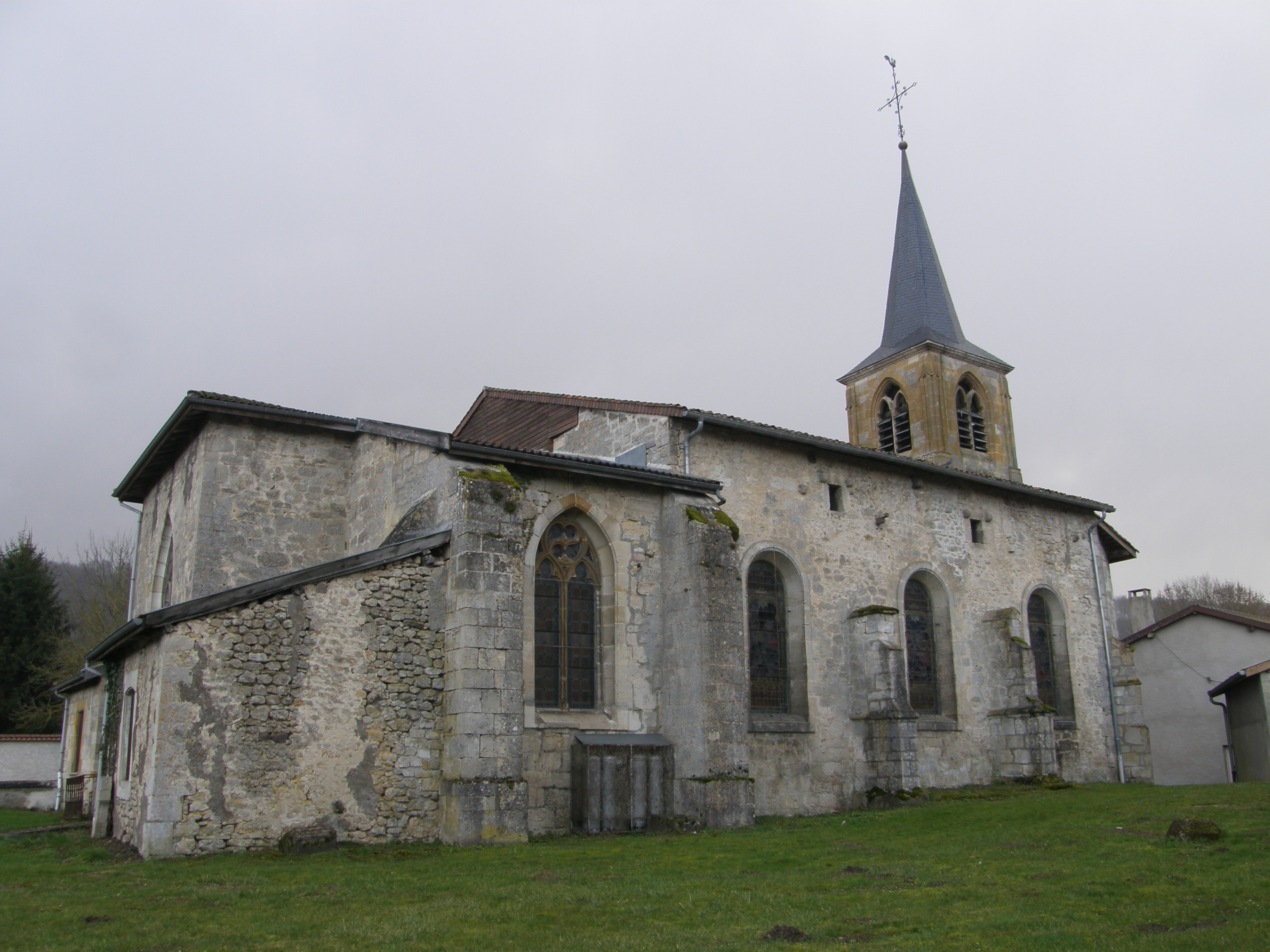 Eglise d'Ecurey-en-Verdunois